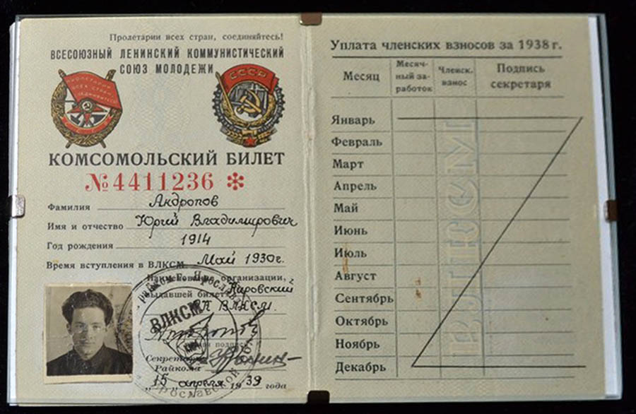 Андропов Юрий Владимирович, комсомольский билет